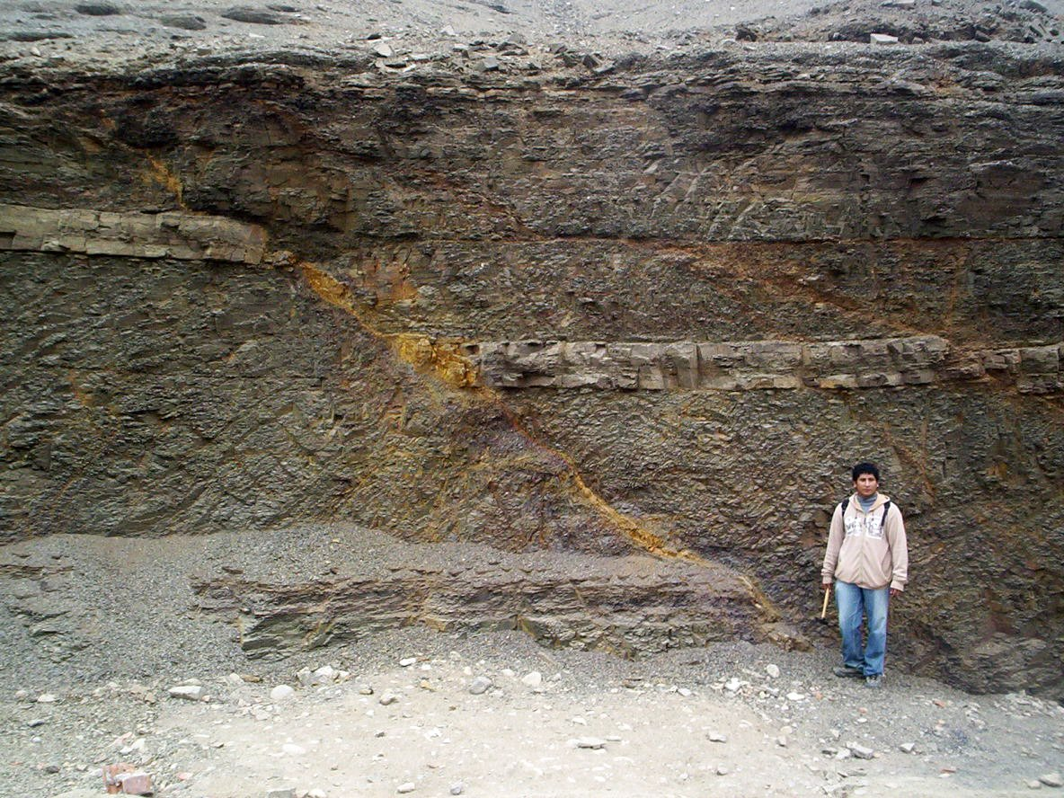 Falla normal en el Morro Solar, Lima Perú.